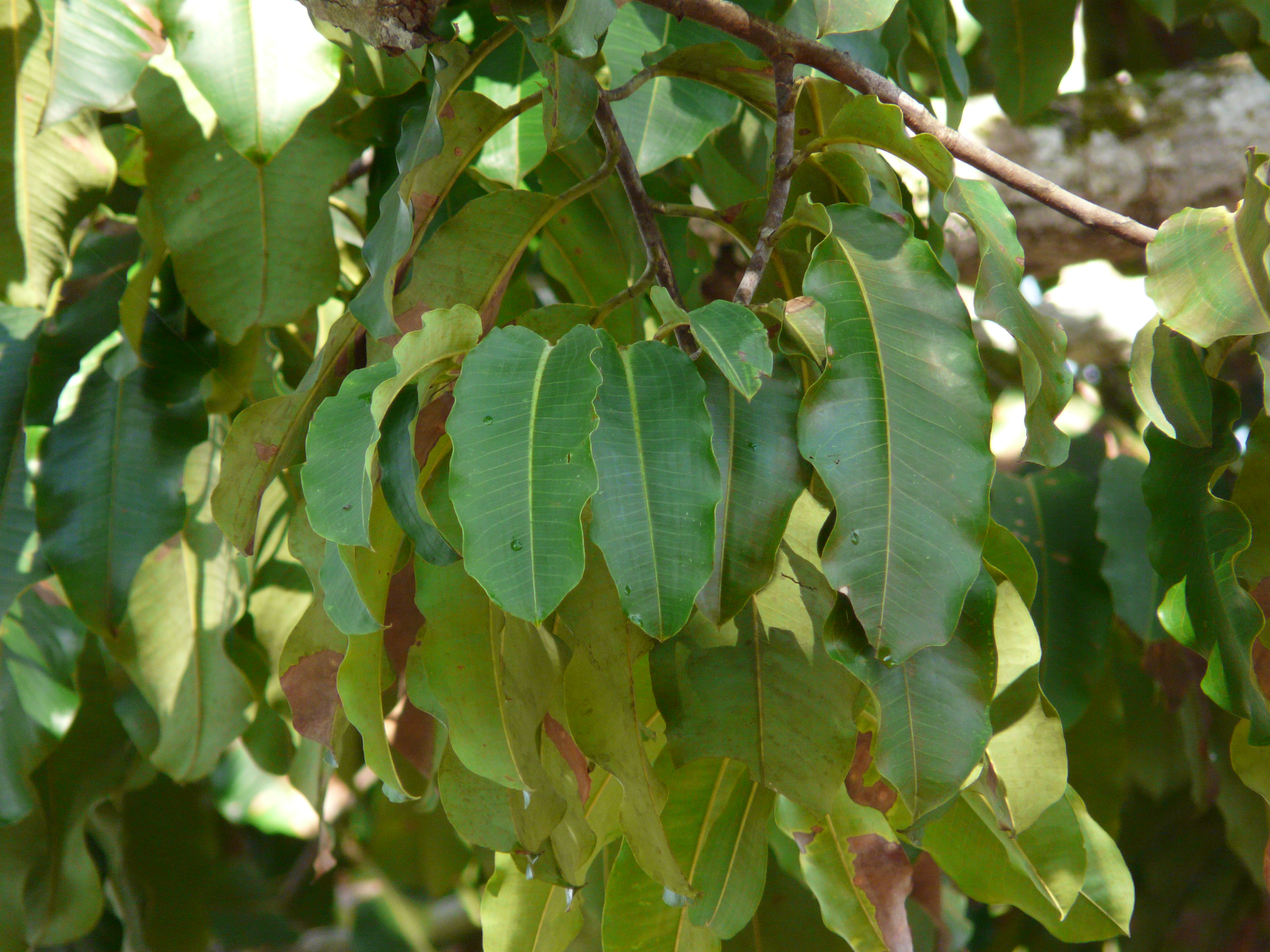 Parapähklipuu (Bertholletia excelsa) lehed. Rio Negro, Amasoonia, mai algus.